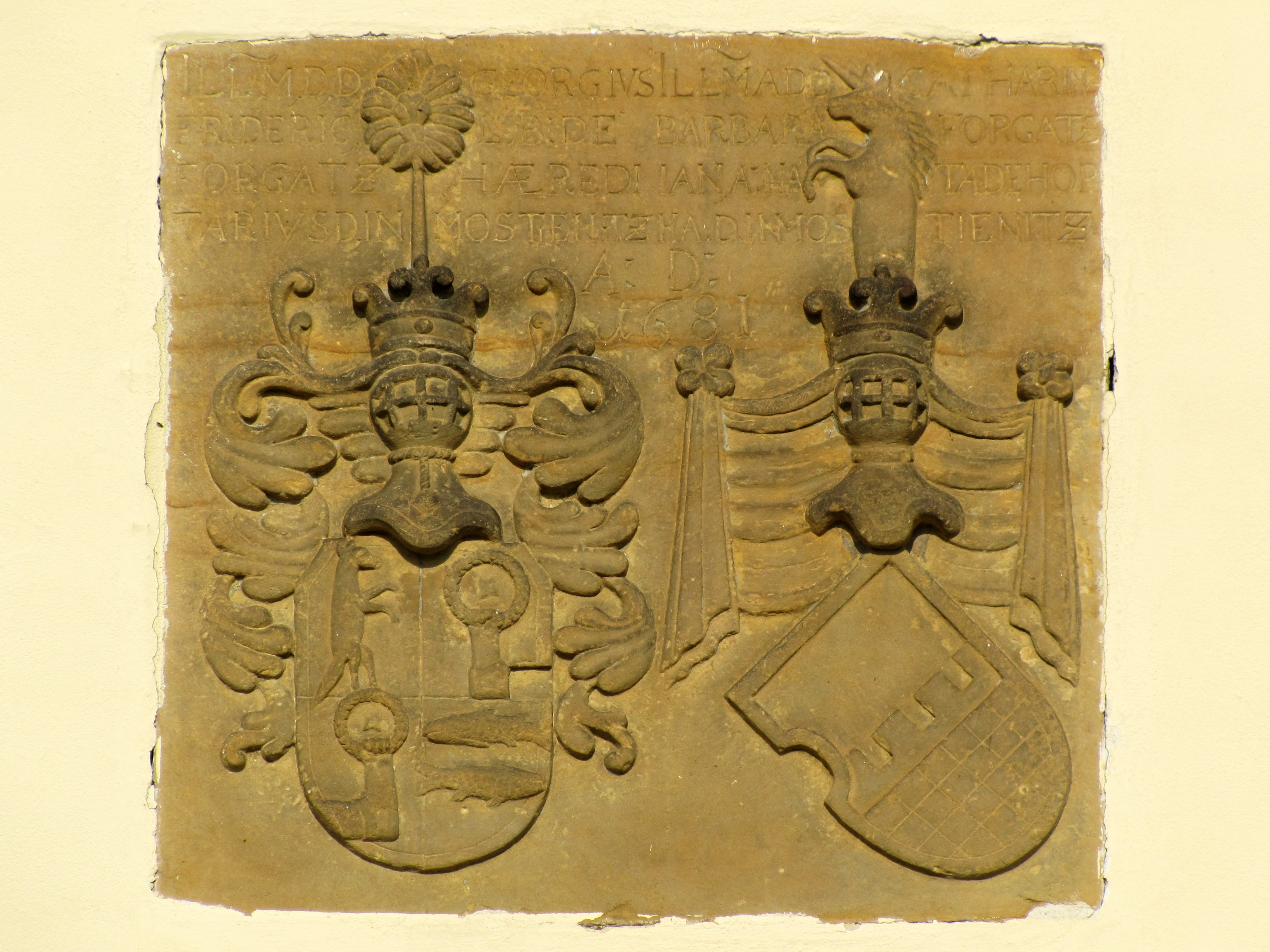 Kostel svatého Jakuba Většího v Ježově, okres Hodonín. Deska nad vstupem do kostela z roku 1681